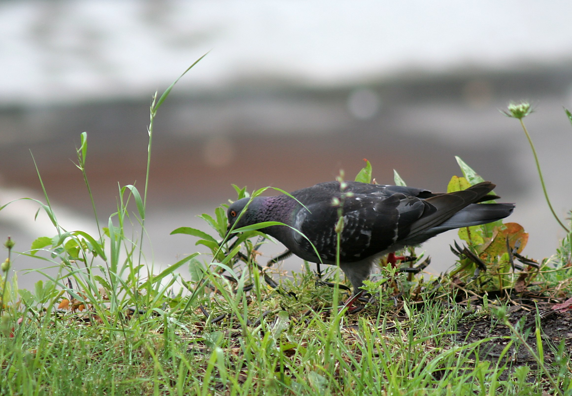 Holub s rozostřeným pozadím.